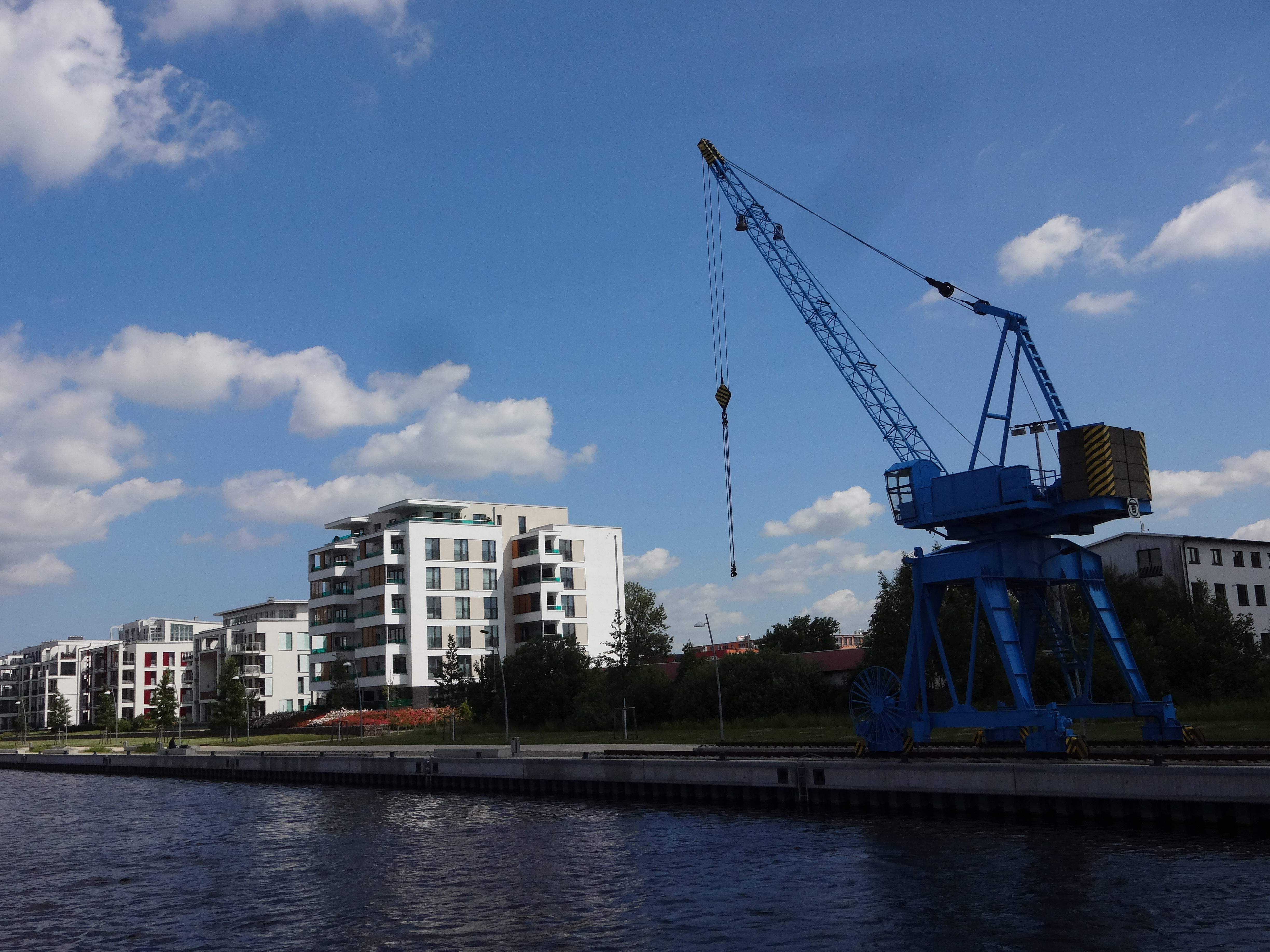 Denkmalgeschützter Kran am Ziegelsee in Schwerin in der Hafenstraße